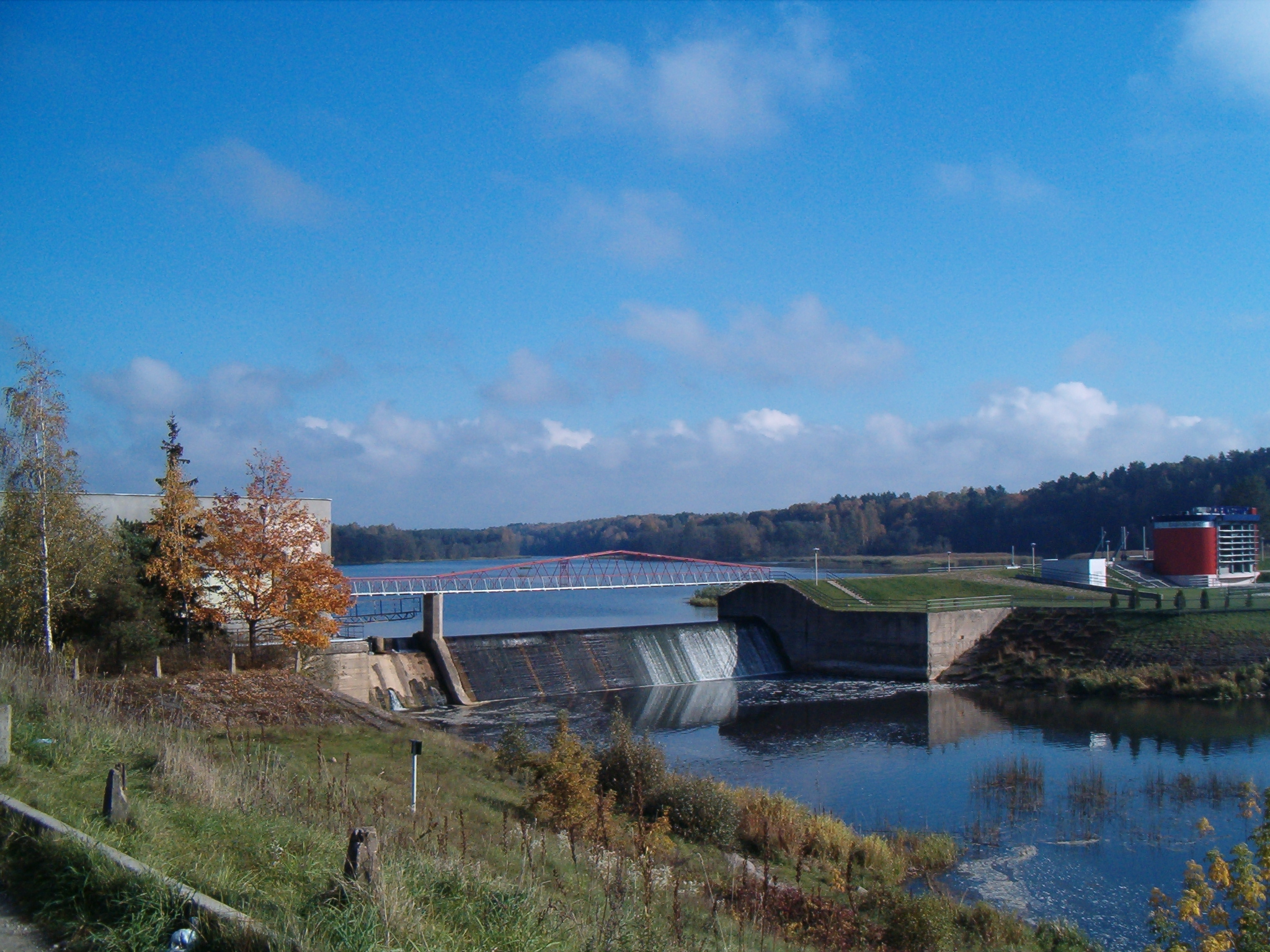 Kavarskas, Lithuania